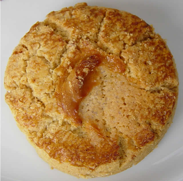 Es el Almendrado, un tipo de pasta típica y tradicional española.